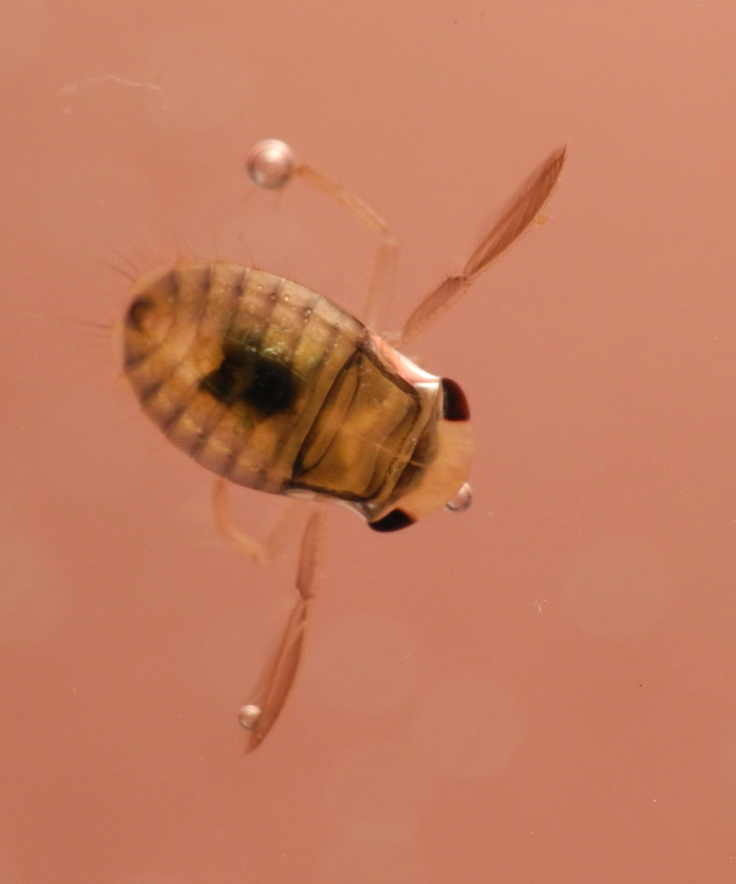 Naucore (Naucoridae sp.). Image prise avec la bonnette Raynox DCR-250.